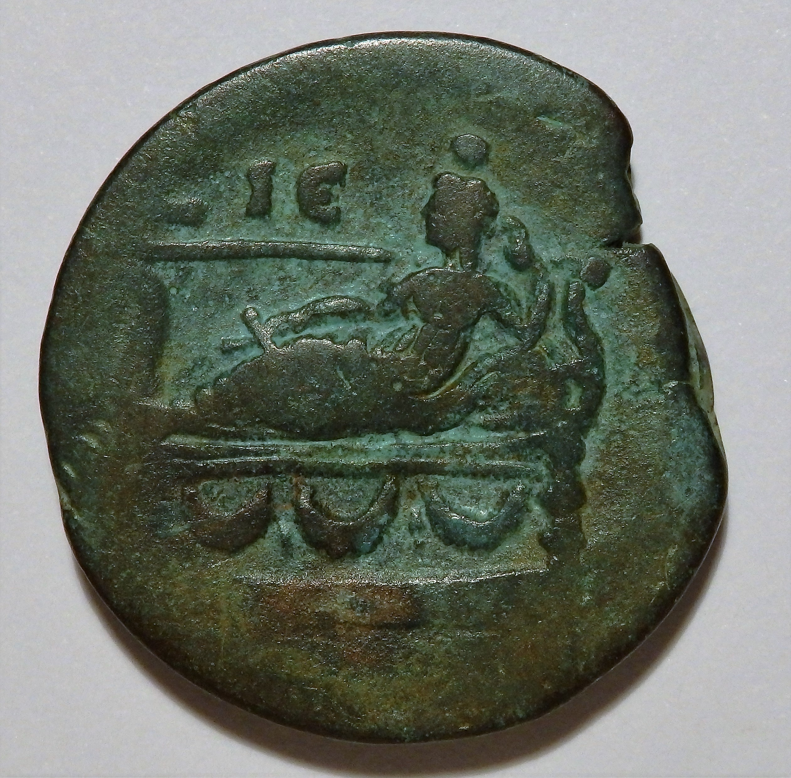 Lectisternium für Tyche auf Bronzemünze aus Alexandria z.Zt. des Antoninus Pius, Kampmann/Ganschow 35.539